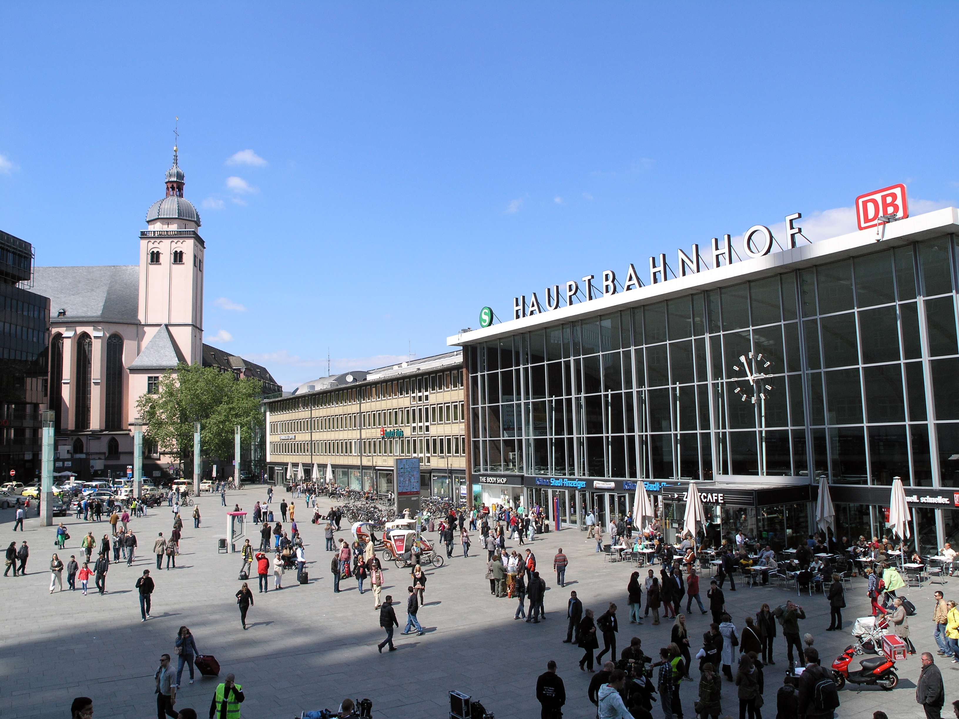 Северный Рейн - Вестфалия, Кёльн. Главный вокзал